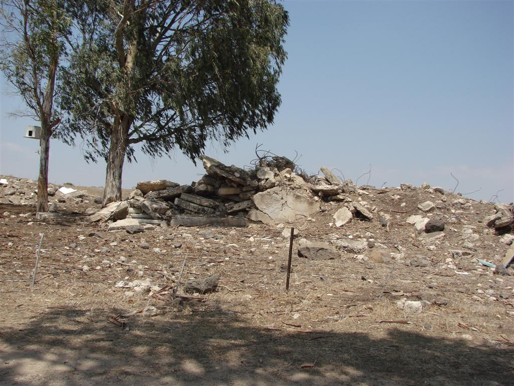 אחוזת נפתלי לייד קרני חיטין